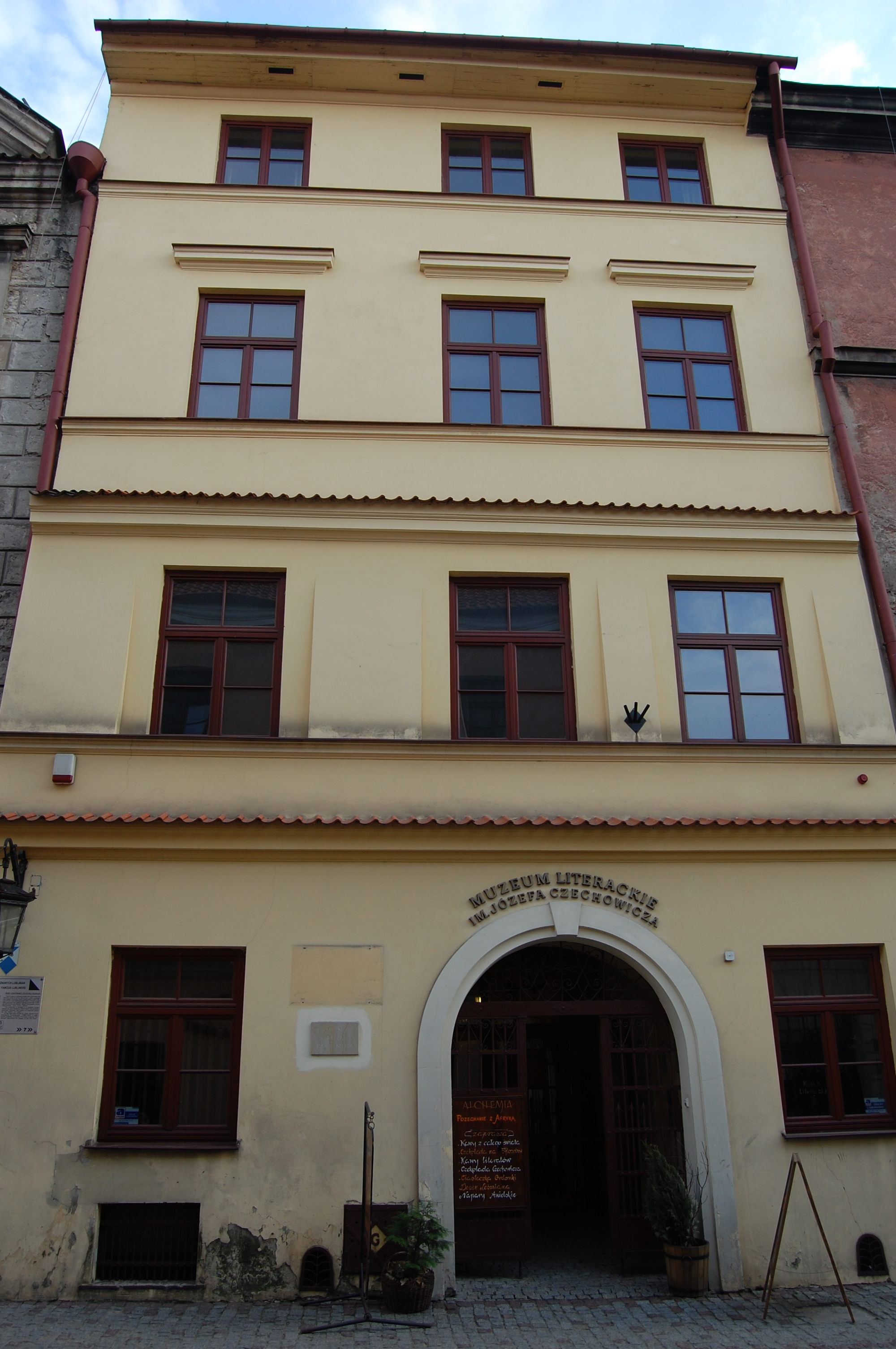 Znajdujący się przy ul. Złotej 3 na Starym Mieście w Lublinie budynek Muzeum Literackiego im. Józefa Czechowicza.